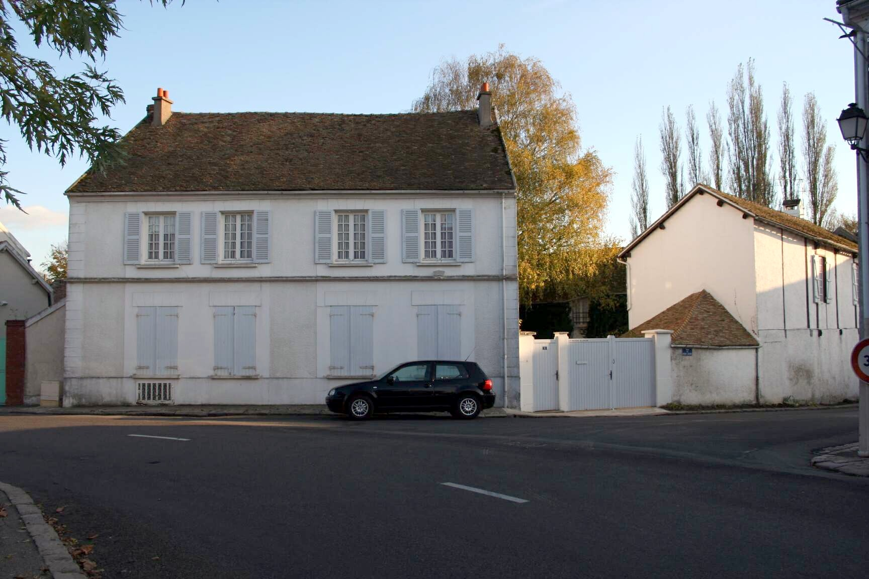 La Maison Blanche à Orvilliers - Yvelines (France)